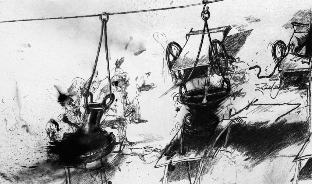 Uwe Ernst: Mahlwerk I (2008)